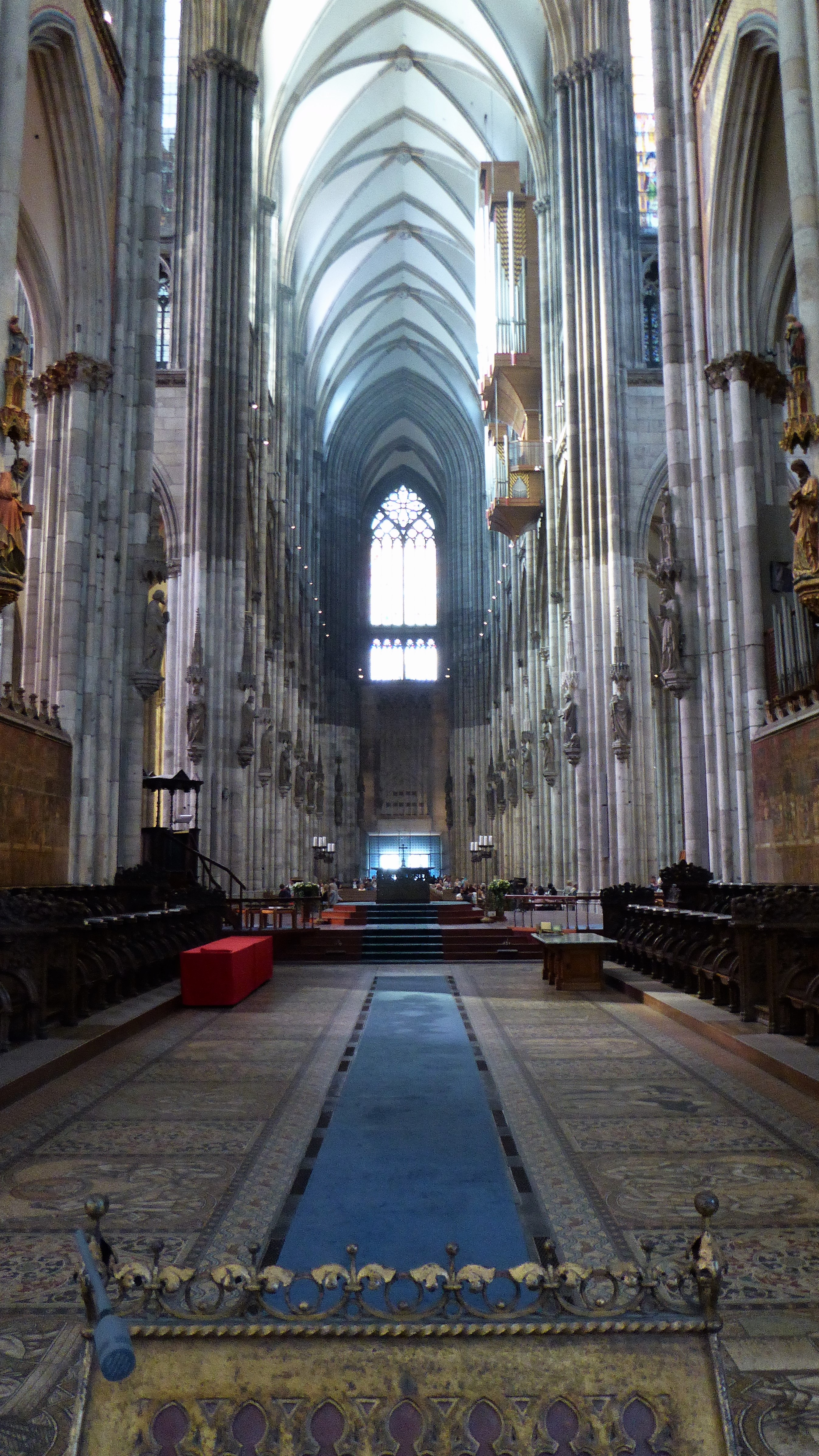 Blick in das Langschiff nach Westen